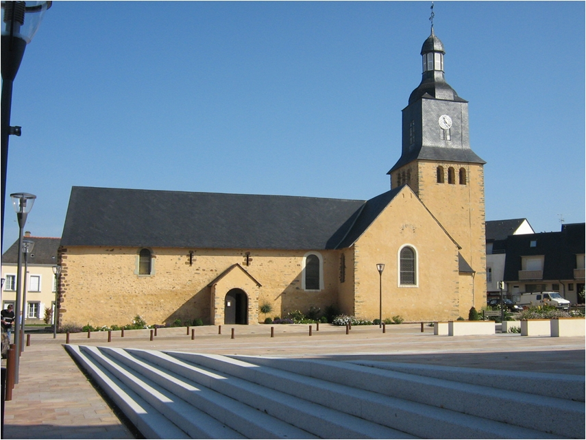 Vue générale de l'église Saint-Siméon de L'Huisserie